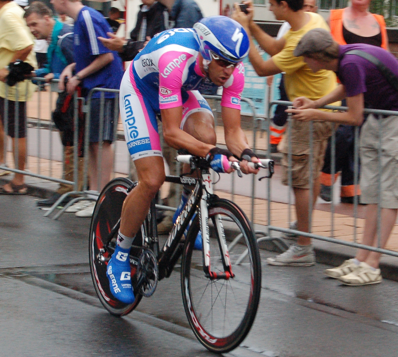 Prologue du Tour de France 2010 - Alessandro Petacchi